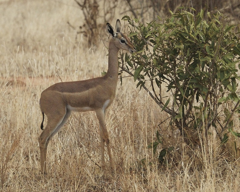 Gerenuk Litocranius walleri Masai Mara, Kenya 690V0012.jpg